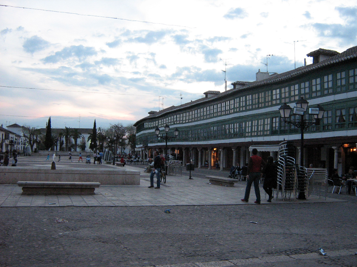 Plaza Mayor de Almagro, en Ciudad Real